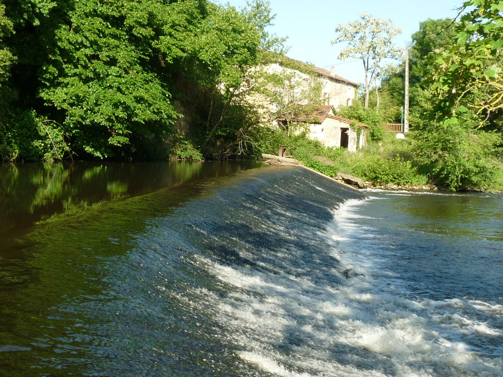 la Tardoire à Lachaise, Vouthon, Charente, France